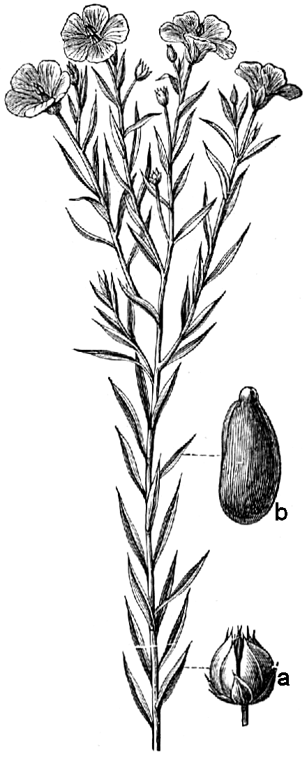 Linum usitatissimum a frukt, b frö (förstoradt).